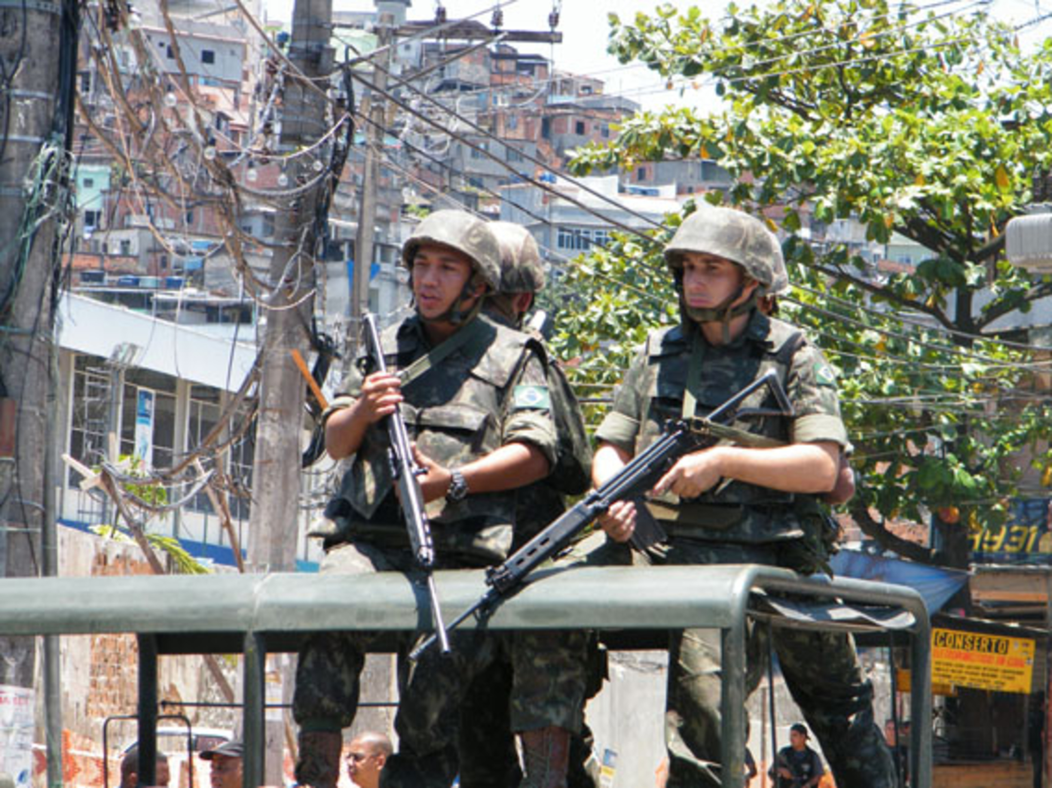 Rio de Janeiro - Exército dá apoio a ocupação do Complexo do Alemão ( Agência Brasil -ABr).